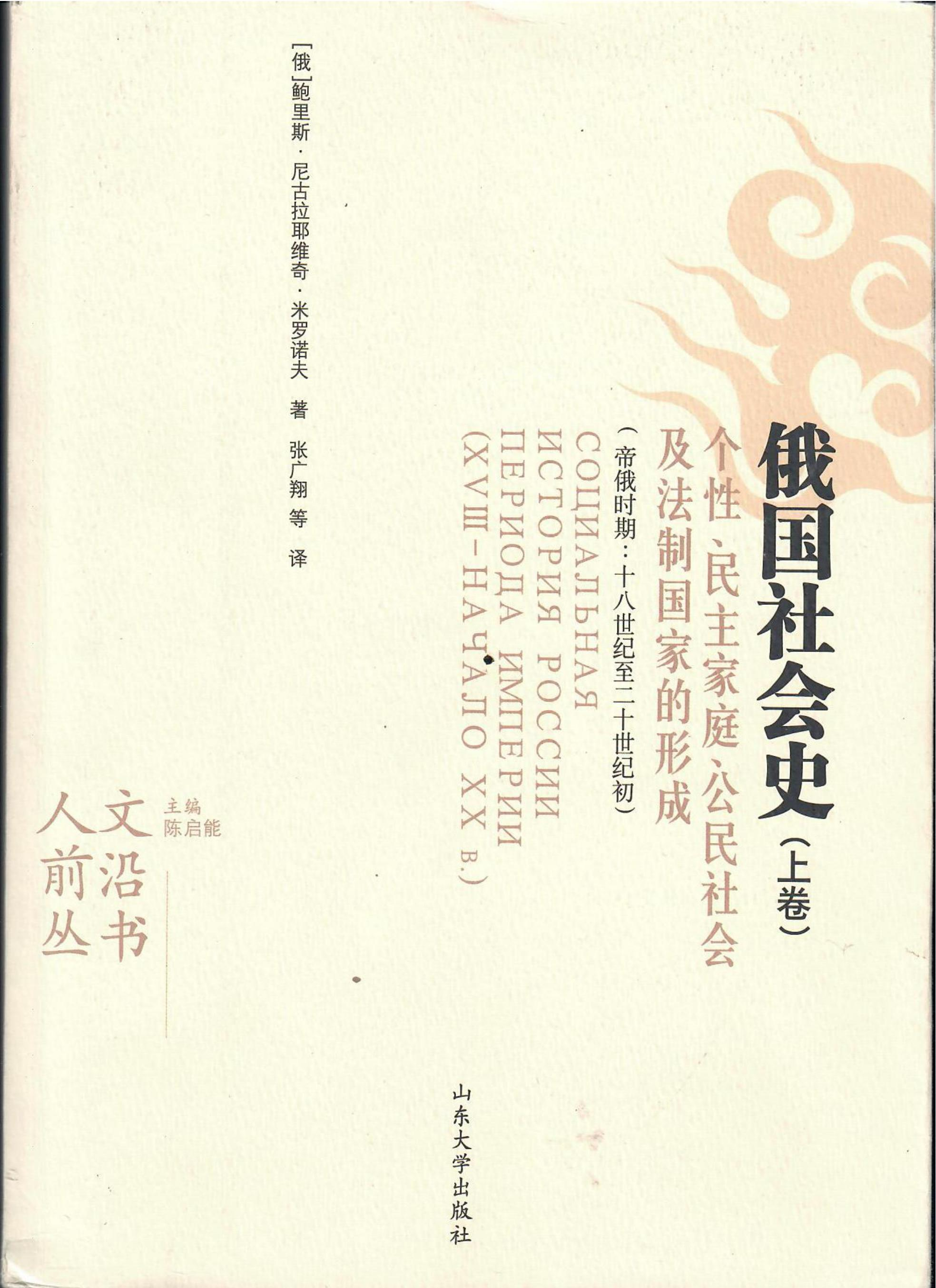 Обложка работы Миронова Б. Н. «Социальная история России периода империи (XVIII — начало XX в.): Генезис личности, демократической семьи, гражданского общества и правового государства». (Перевод на китайский язык. Цзинань: изд-во Шаньдонского ун-та, 2006. В 2 тт.).